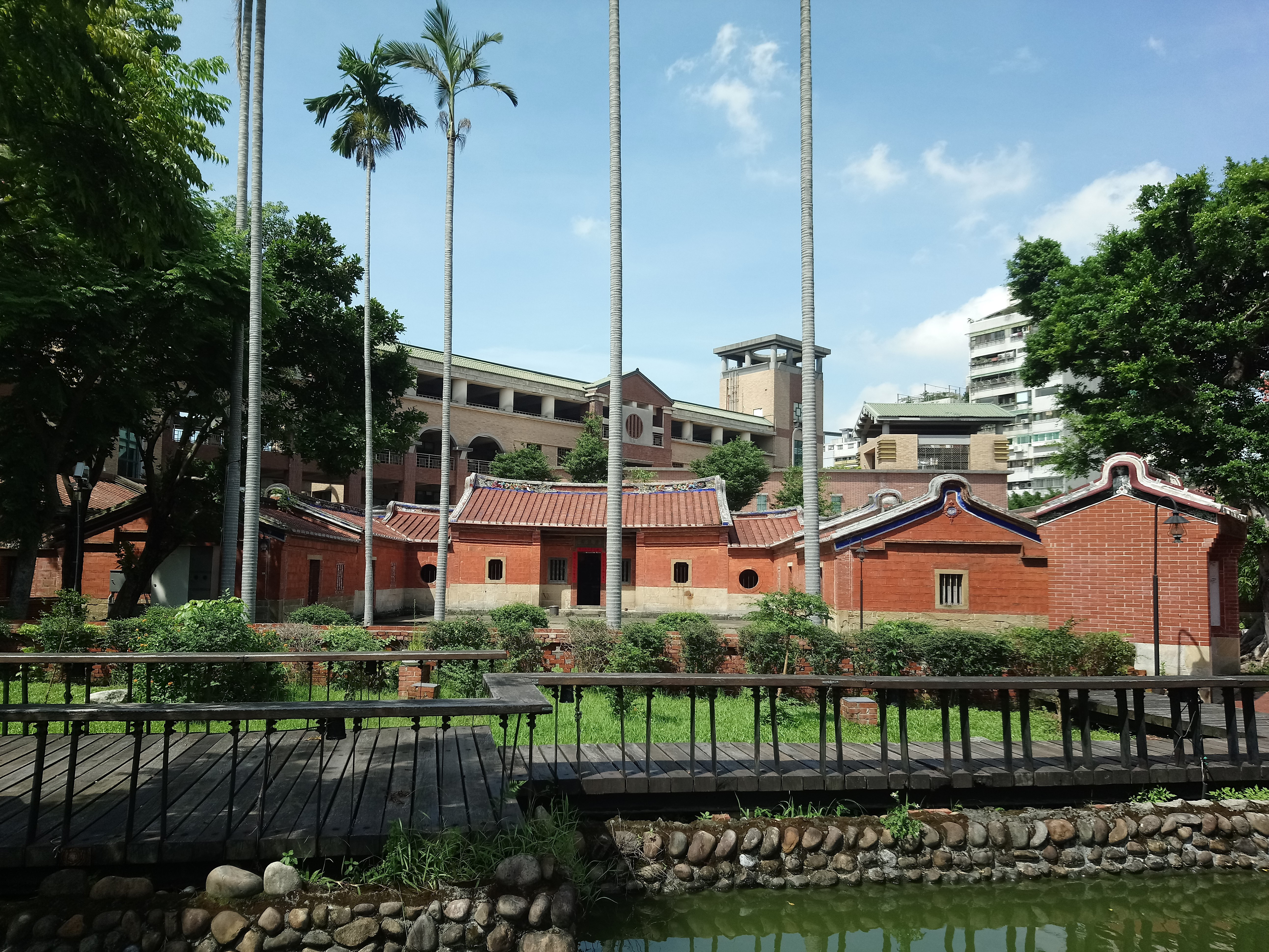 龍安坡黃宅濂讓居正廳及兩側護龍